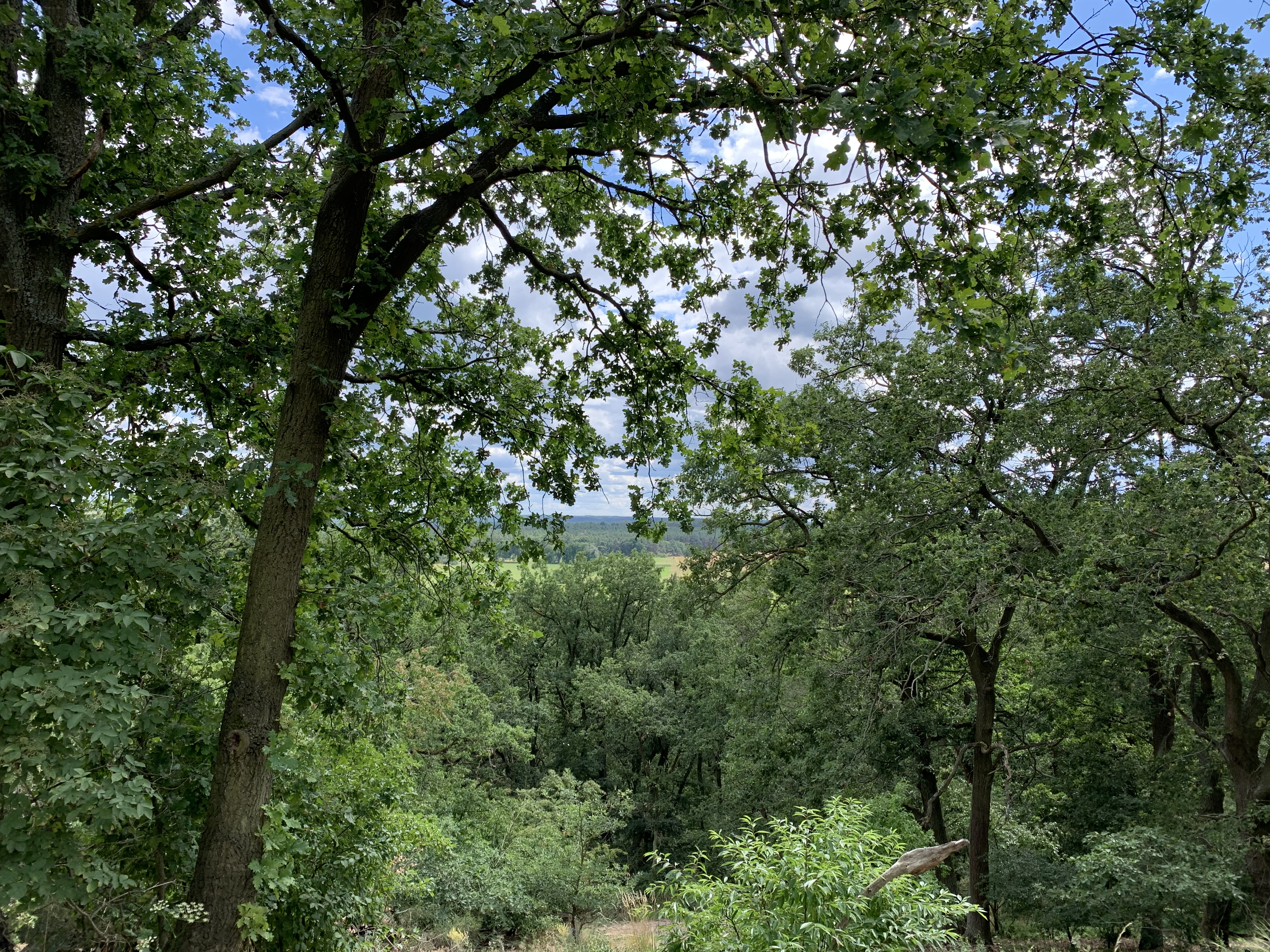 Der Großmachnower Weinberg ist ein 12,89 Hektar großes Naturschutzgebiet im Landkreis Teltow-Fläming in Brandenburg.